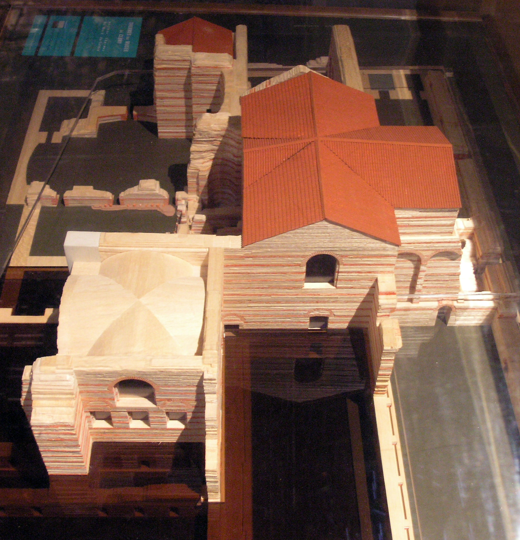 Maquette des thermes de Cluny